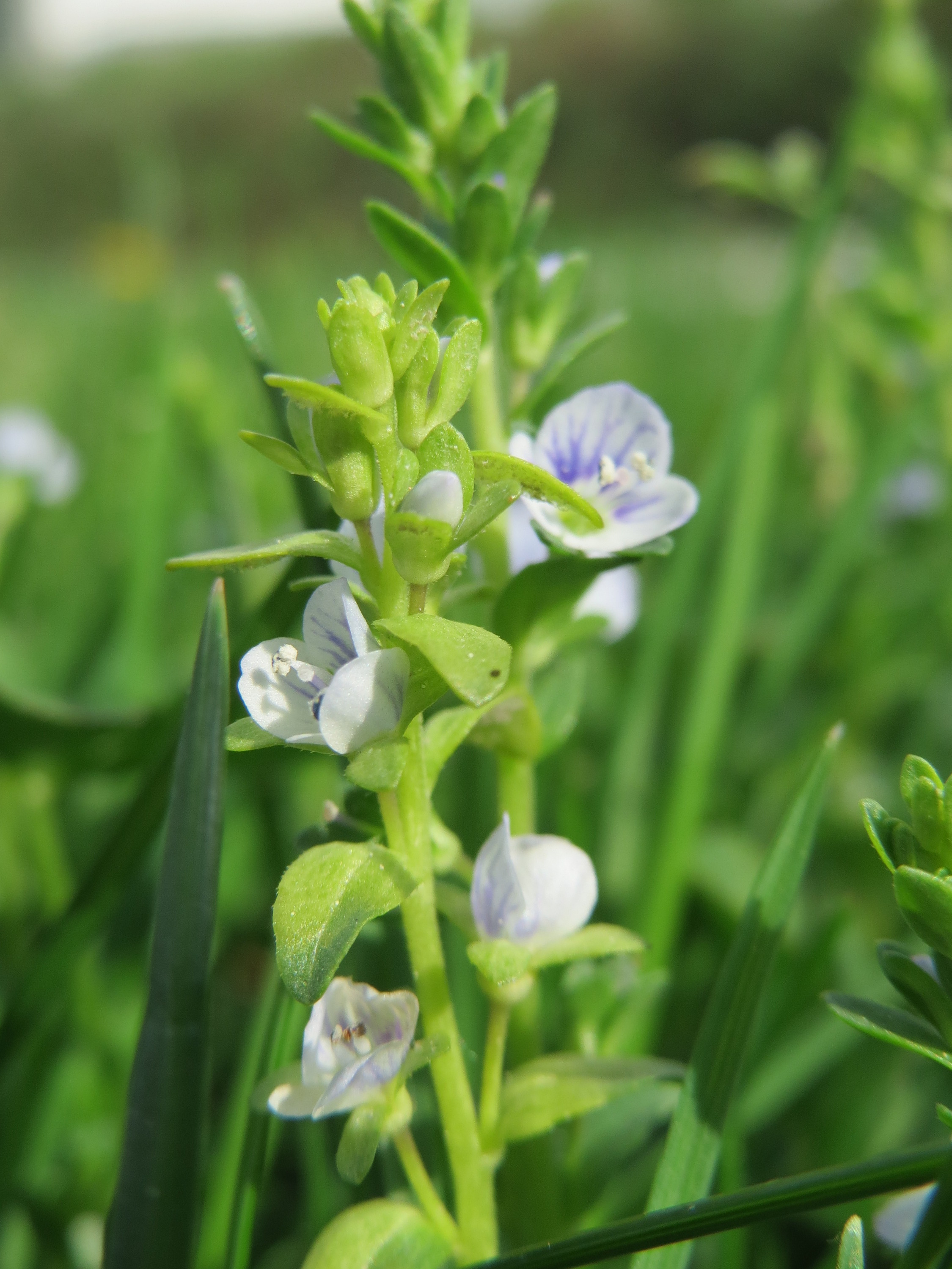 Quendel-Ehrenpreis (Veronica serpyllifolia) am Wasserturm in Hockenheim